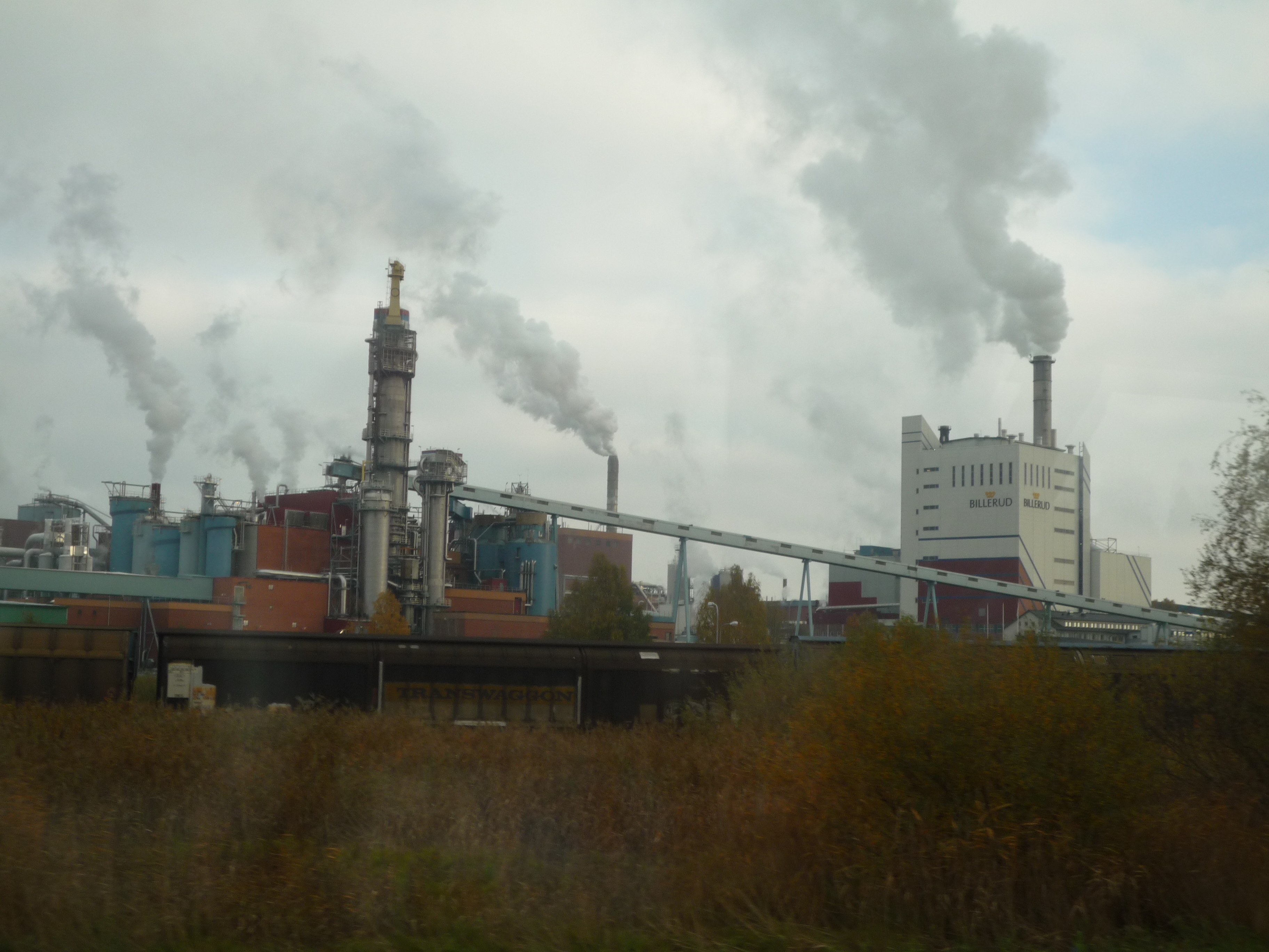 Фабрик Billerud